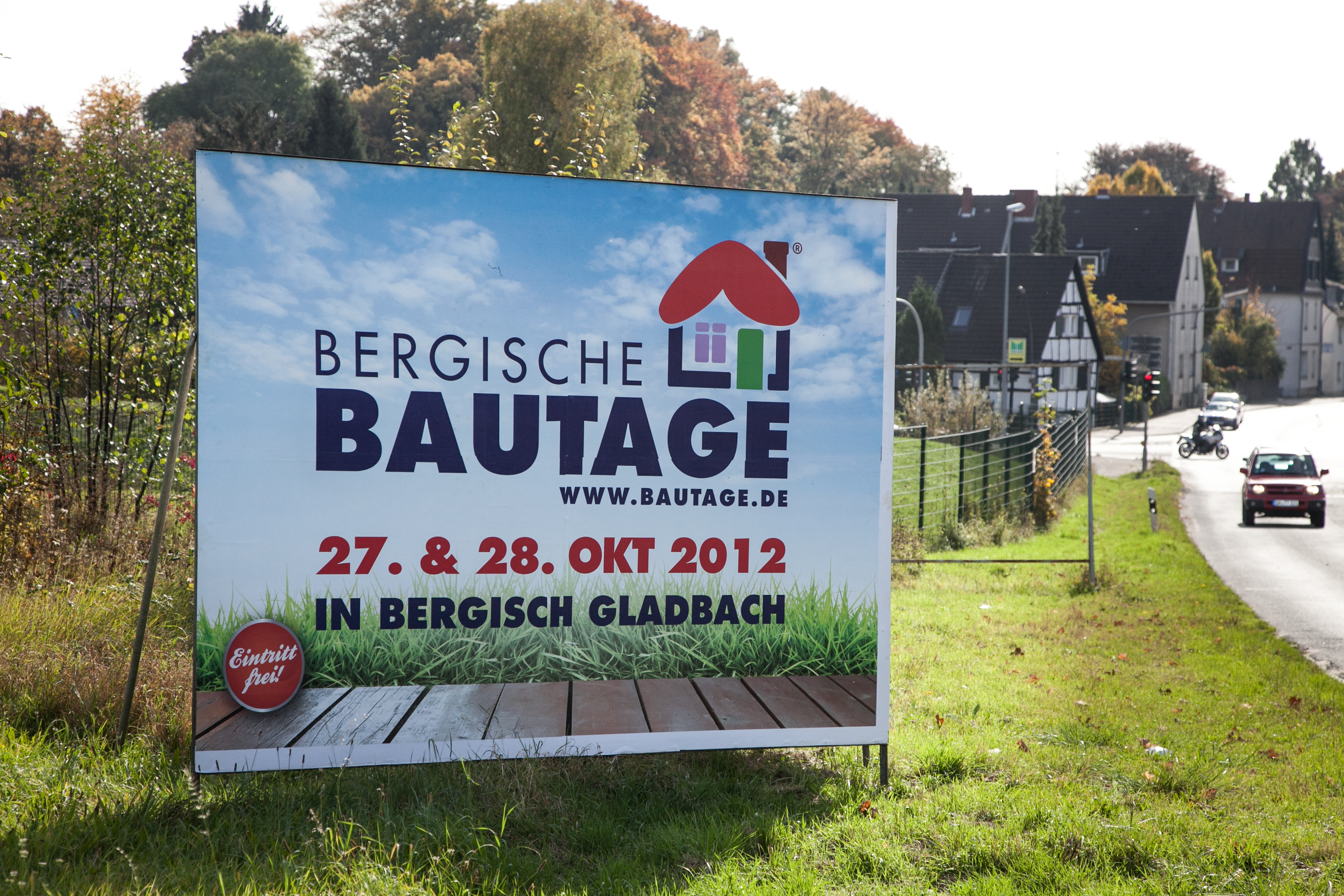 So und kleiner wurden die Bergischen Bautage 2012 auf dem Konrad-Adenauer-Platz und im Bergischen Löwen in Bergisch Gladbach beworben.